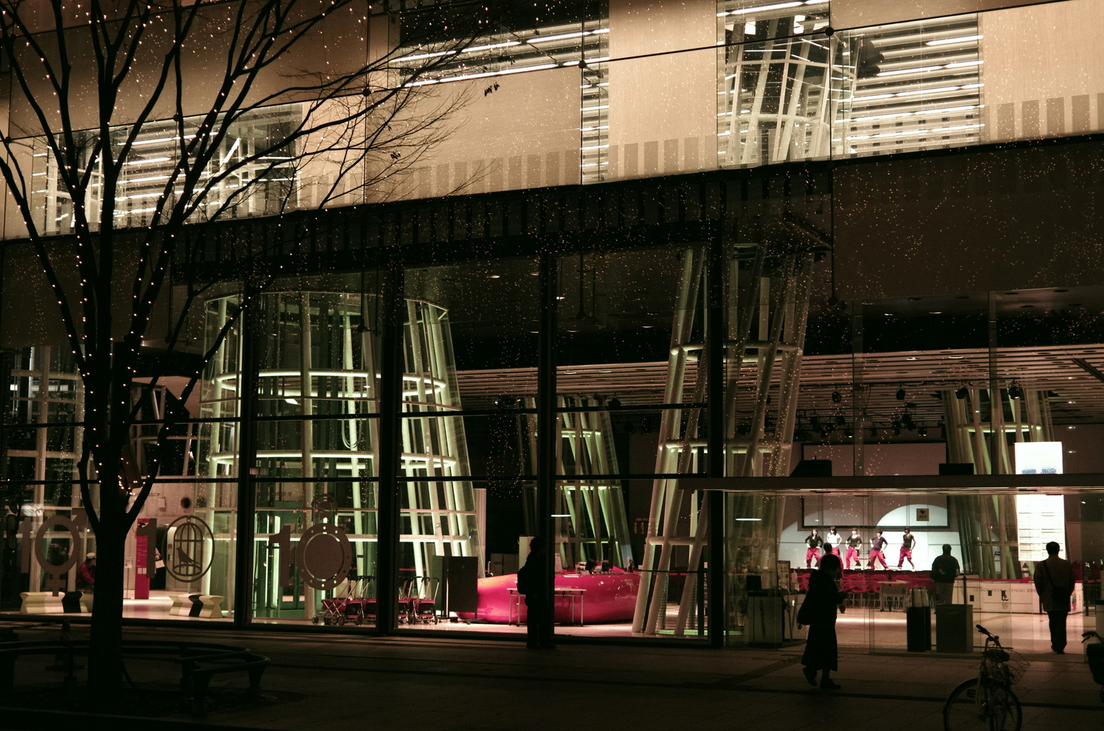 メディアテーク Sendai Mediatheque